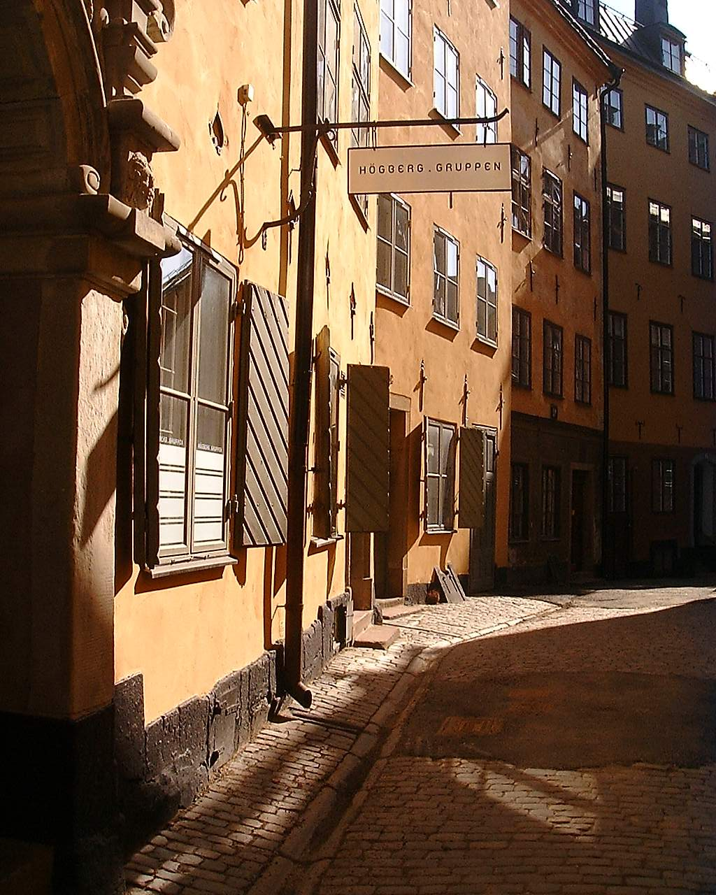 Bollhusgränd, Gamla stan, Stockholm.